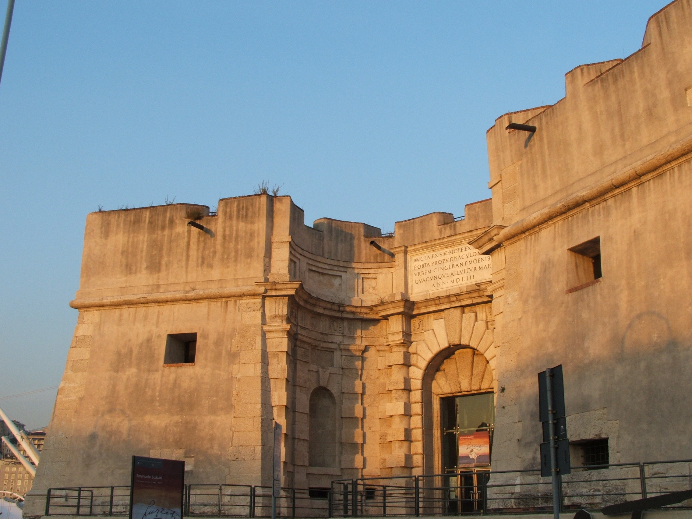 Porto antico di Genova Porta Siberia